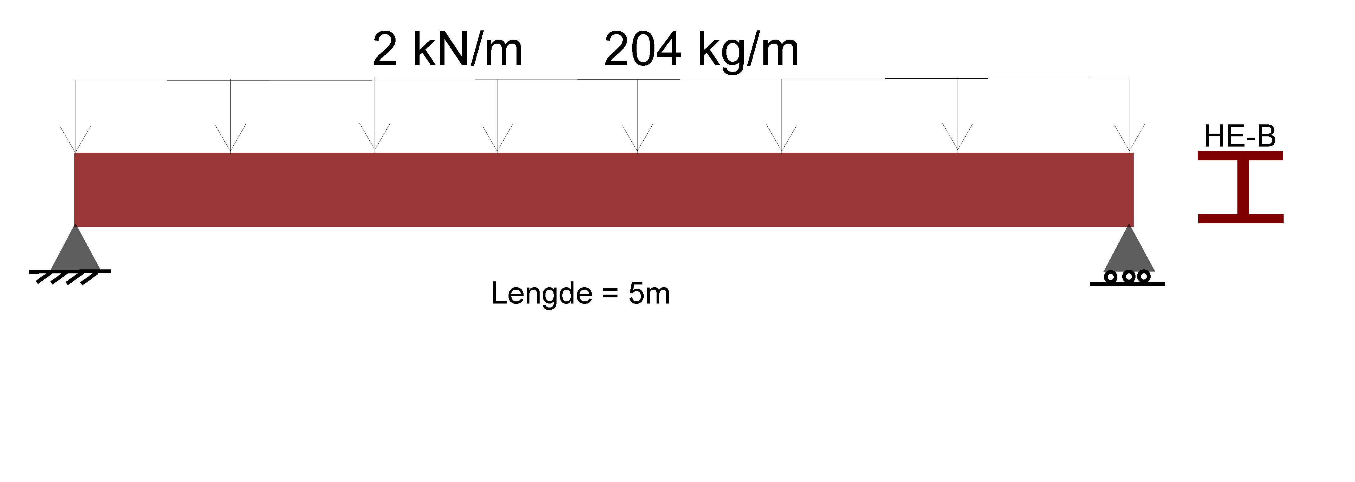 Eksempel stålbjelke